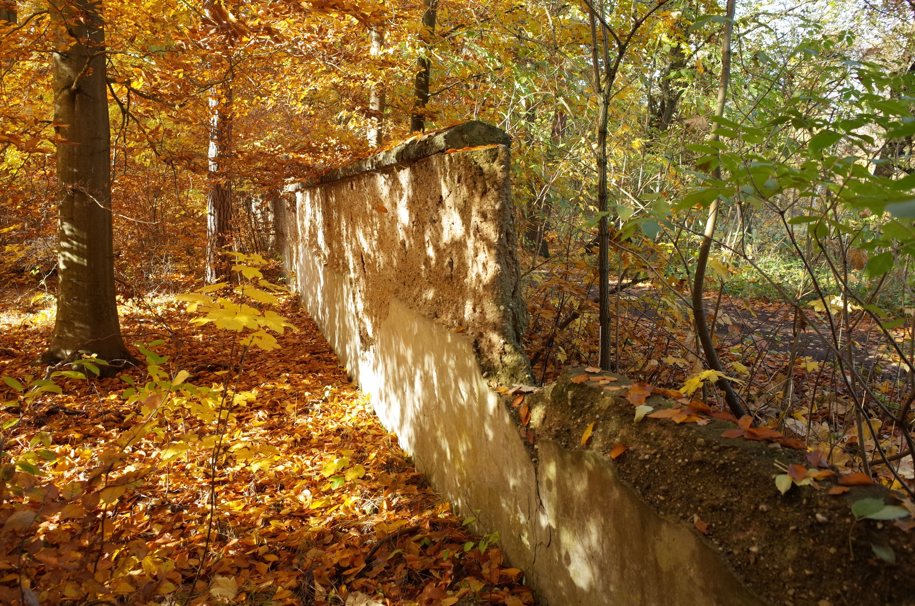 Dessau-Roßlau, Mosigkauer Heide, Kiesmauer (Baudenkmal im Denkmalverzeichniss Sachsen-Anhalt, Erfassungsnummer: 094 40247 000 000 000 000 [1])